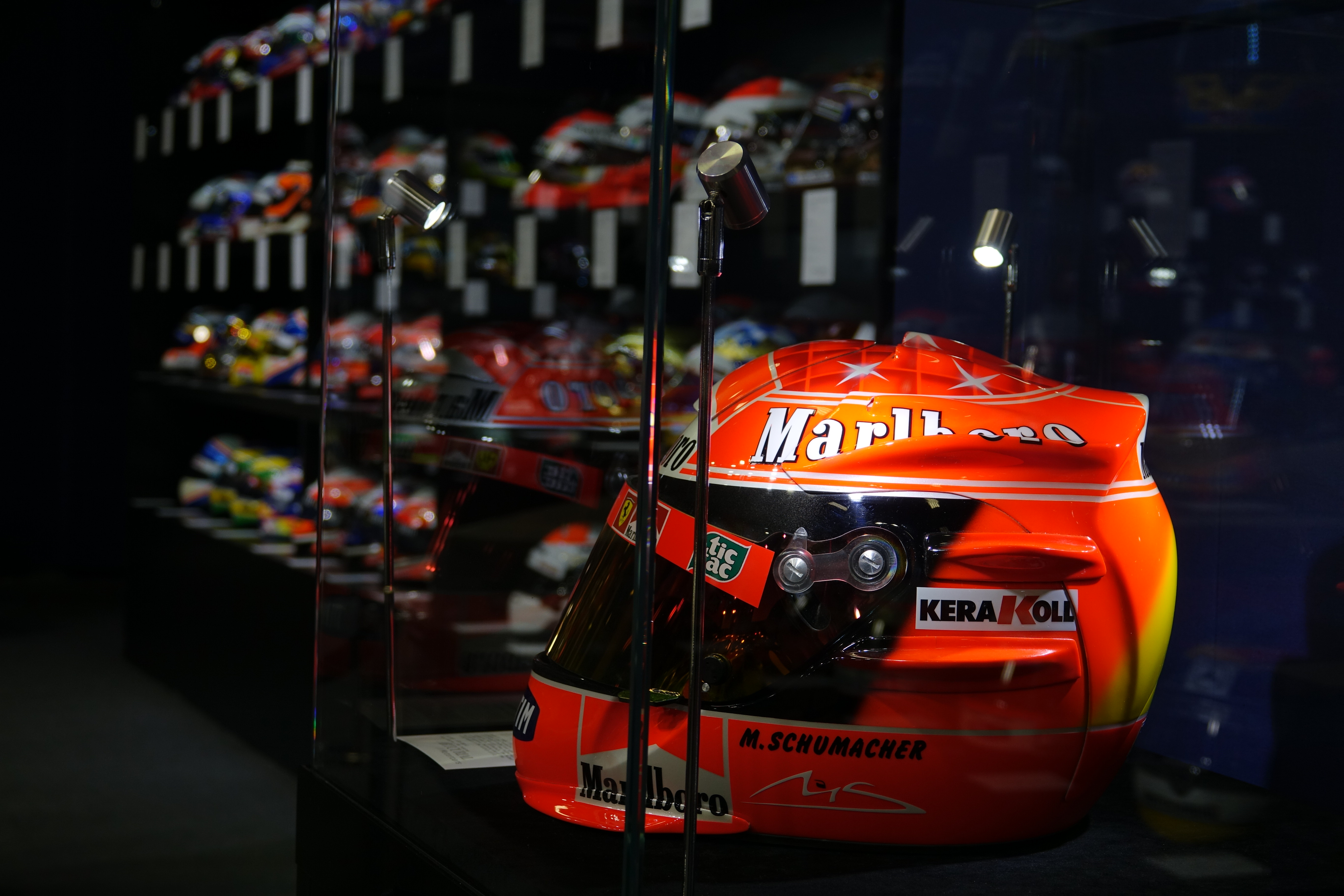 Vente Artcurial Rétromobile 2019